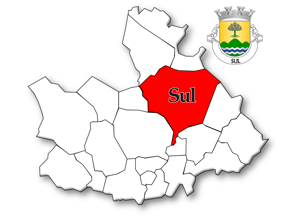 Mapa das Freguesias